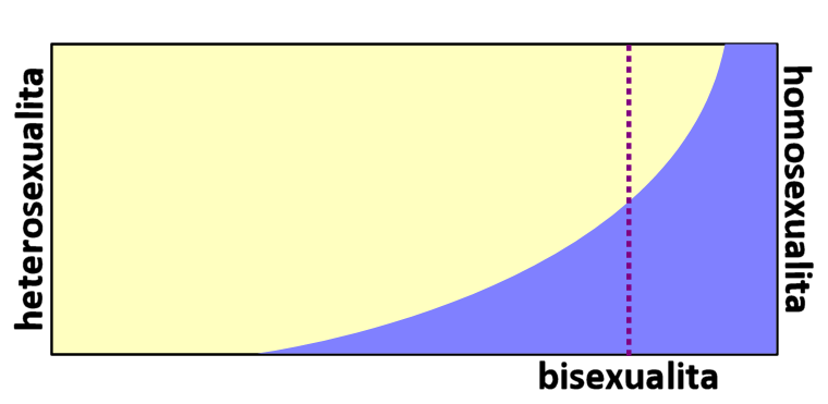 Zakreslený obdélník představuje celou lidskou společnost nebo její reprezentativní vzorek. Uvnitř obdélníku existuje jakési heterosexuálně homosexuální kontinuum, spojité spektrum, od levého, heterosexuálního okraje, kde jsou umístěny osoby jednoznačně heterosexuálně orientované, až po pravý, homosexuální okraj, při němž stojí osoby jednoznačně homosexuálně vyhraněné. Tato vyhraněnost se týká prožívání, tedy toho, kým je osoba pohlavně vzrušována a přitahována, zda osobou stejného, nebo opačného pohlaví. Mezi těmito krajními polohami se nacházejí osoby schopné vzrušit se jak objektem opačného, tak objektem stejného pohlaví. (...) Poměr této heterosexuální a homosexuální vzrušivosti je přiližně vyznačen zakreslenou křivkou. Svislá přerušovaná čára představuje poměr heterosexuální a homosexuální vzrušivosti 1:1, tedy bisexuálně zaměřené osoby.